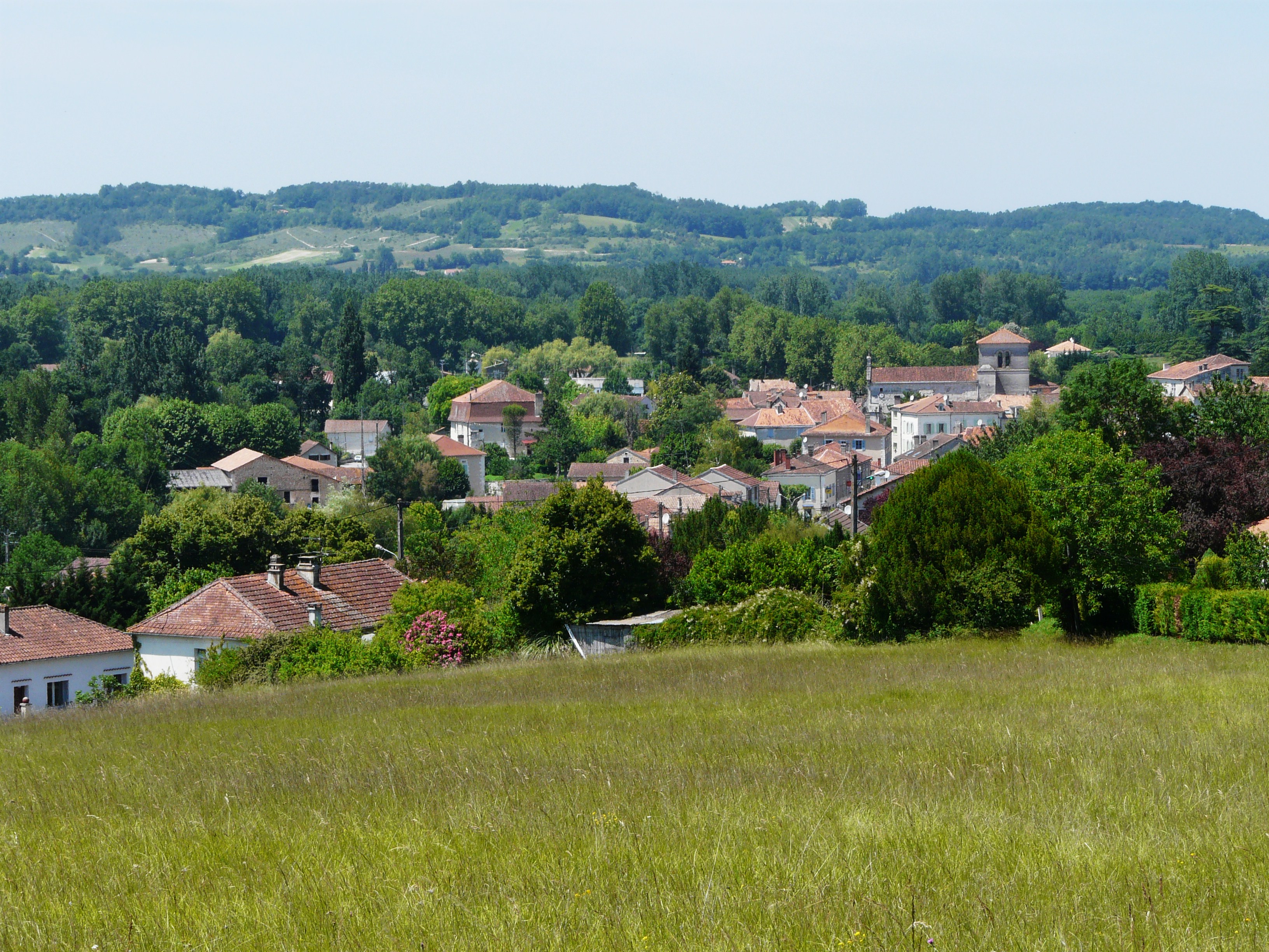 Le bourg de Lisle vu du sud-est, Dordogne, France.